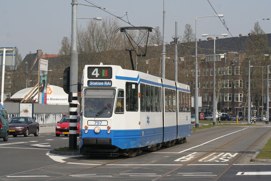 GVB 797 te Amsterdam (Europaplein) april 2007